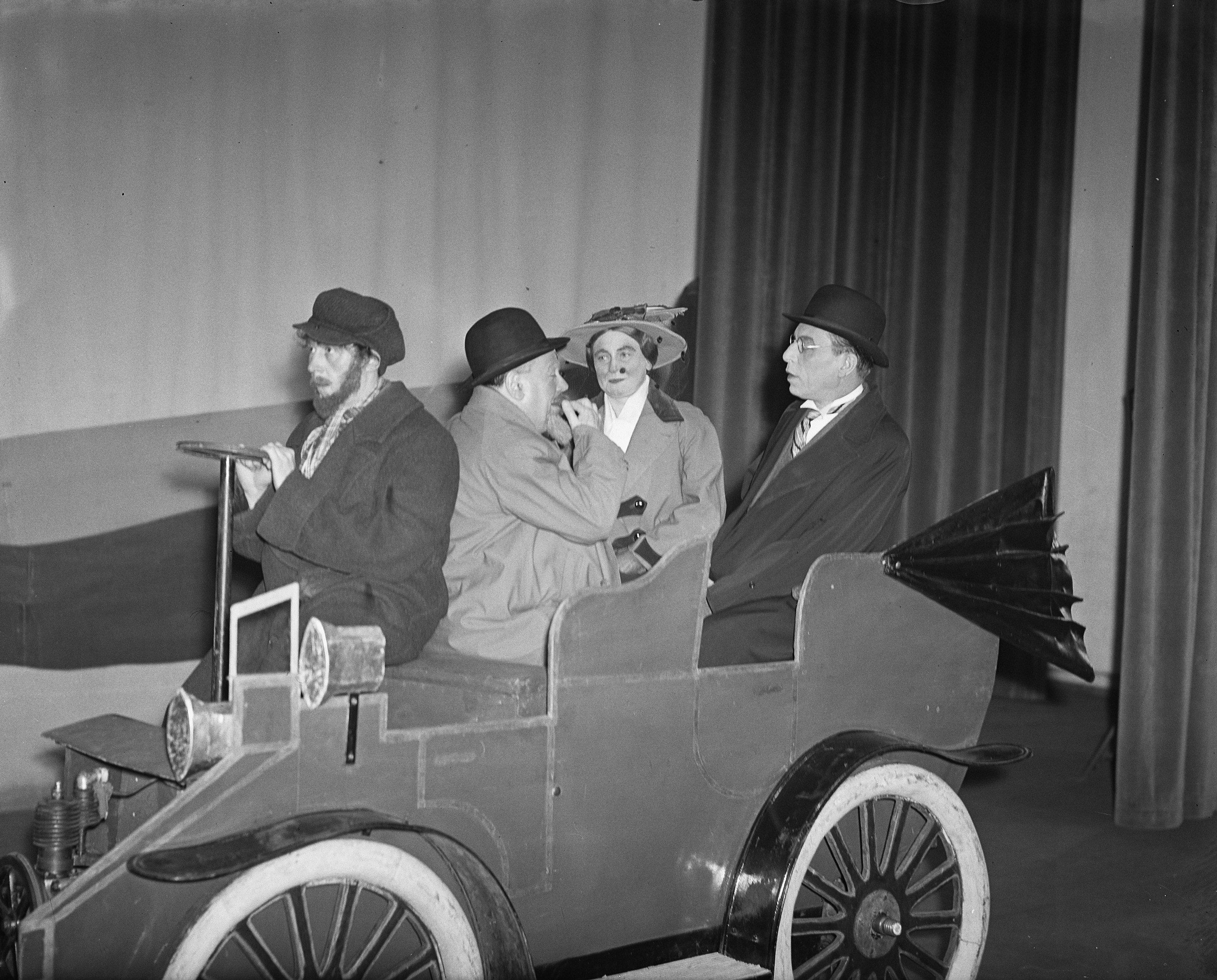 Collectie / Archief : Fotocollectie Anefo Reportage / Serie : [ onbekend ] Beschrijving : Louis Jouvet in Knock. Annotatie : Franse acteur en theaterregisseur in toneelstuk van MoliÃ¨re Datum : 6 maart 1950 Trefwoorden : acteurs, toneel Persoonsnaam : Jouvet, Louis Fotograaf : Nijs, Jac. de / Anefo Auteursrechthebbende : Nationaal Archief Materiaalsoort : Glasnegatief Nummer archiefinventaris : bekijk toegang 2.24.01.09 Bestanddeelnummer : 903-8512